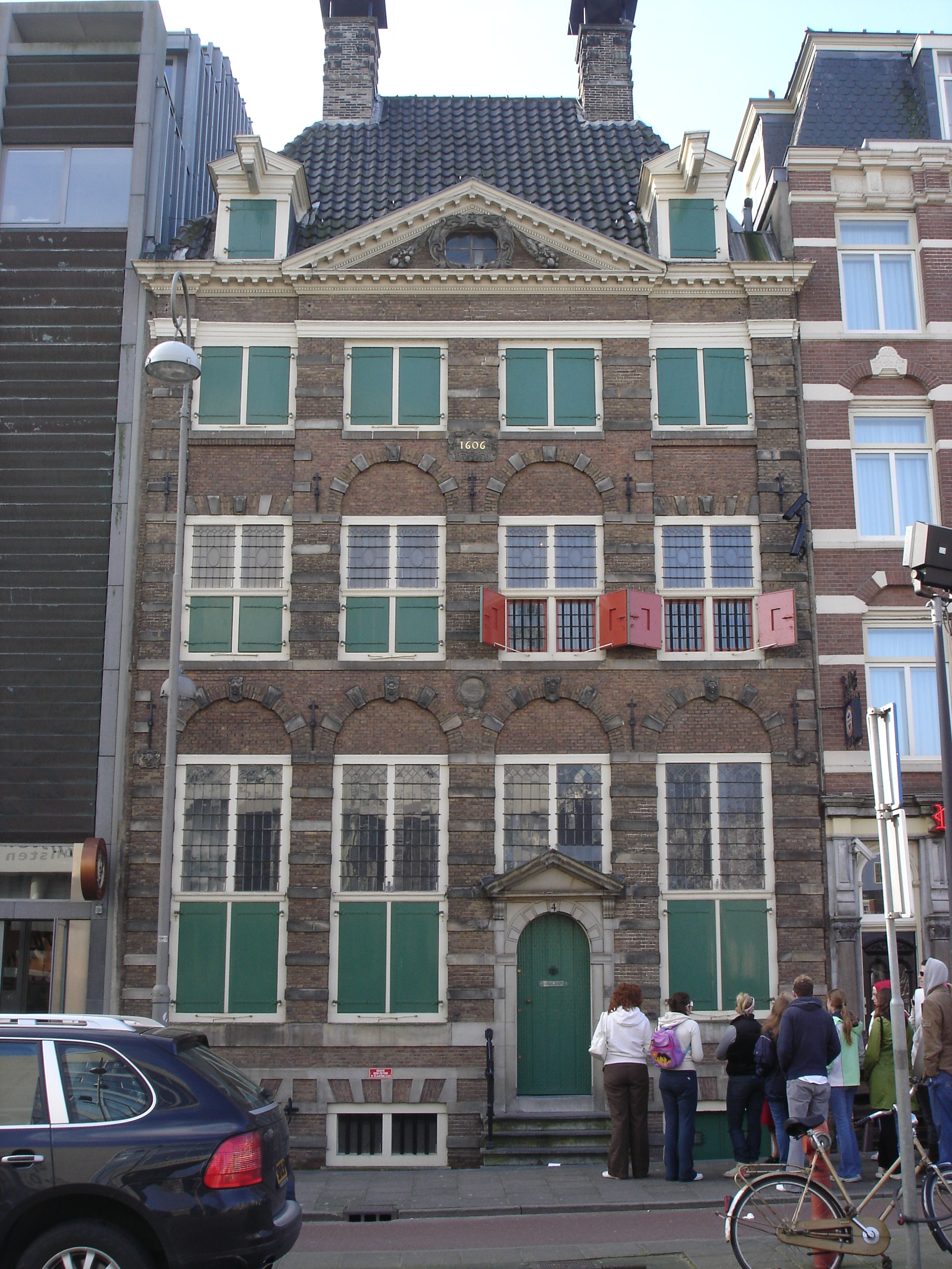 La maison de Rembrandt